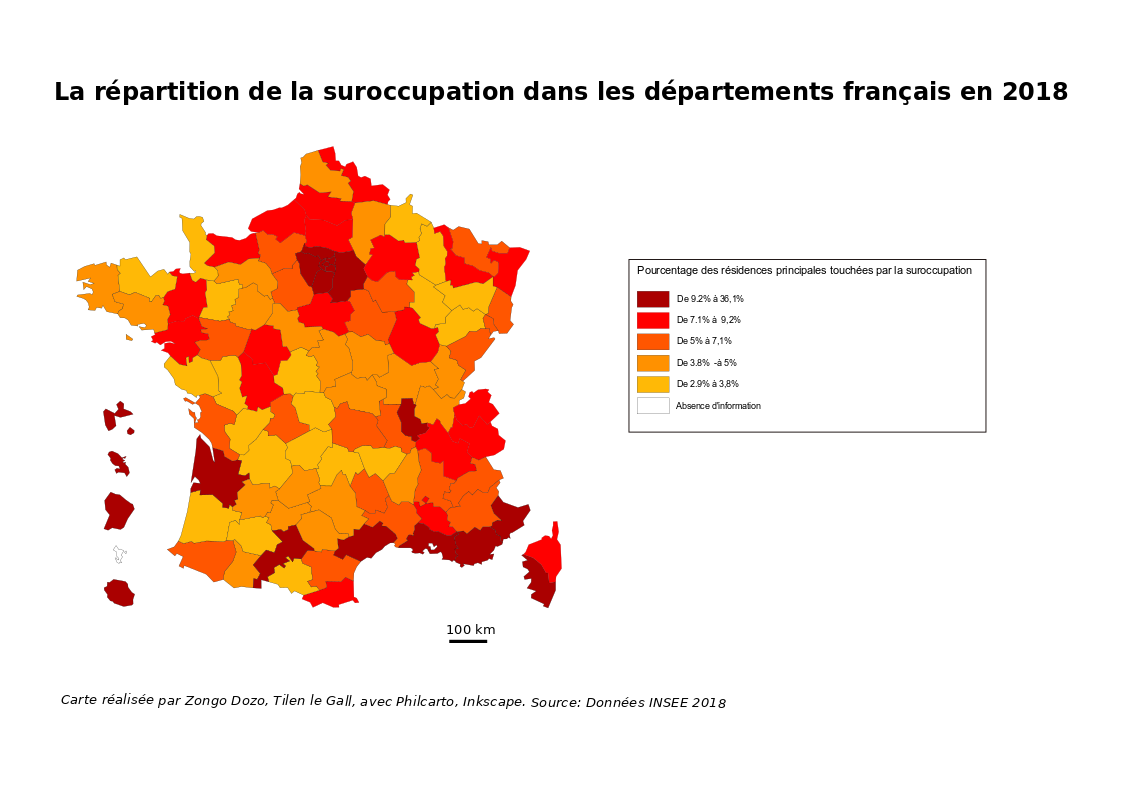 Cette carte illustre que les départements possédant des grandes villes ainsi que les départements d'outre mer sont particulièrement touchés par le phénomène de sur occupation qui est l'un des critères afin d'identifier le mal logement.